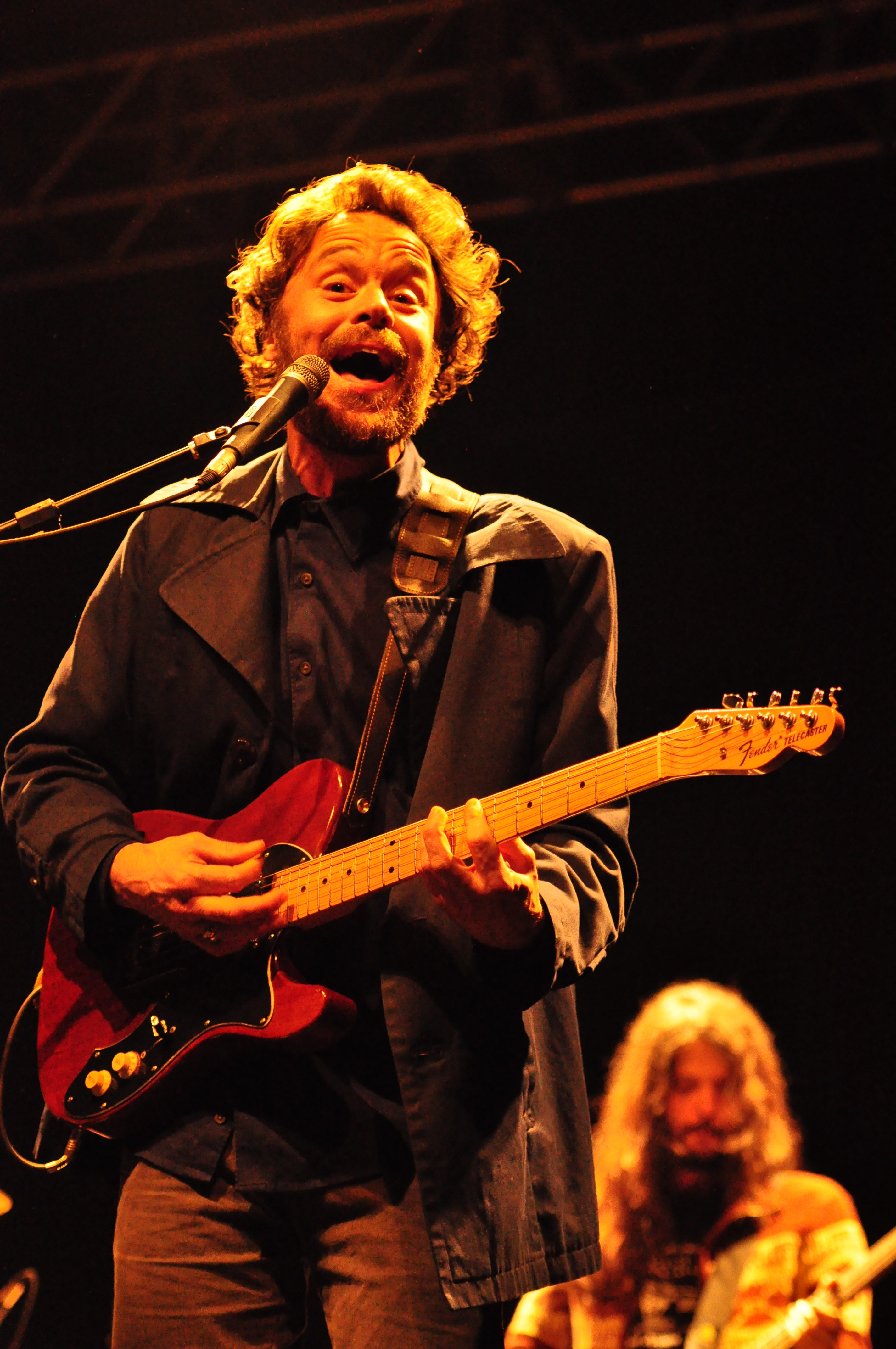 Foto: Priscila Leal